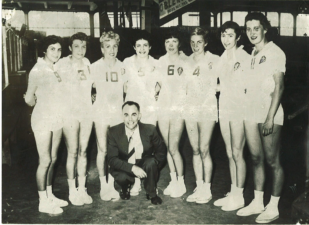 Equipe de l'ASM en 1958